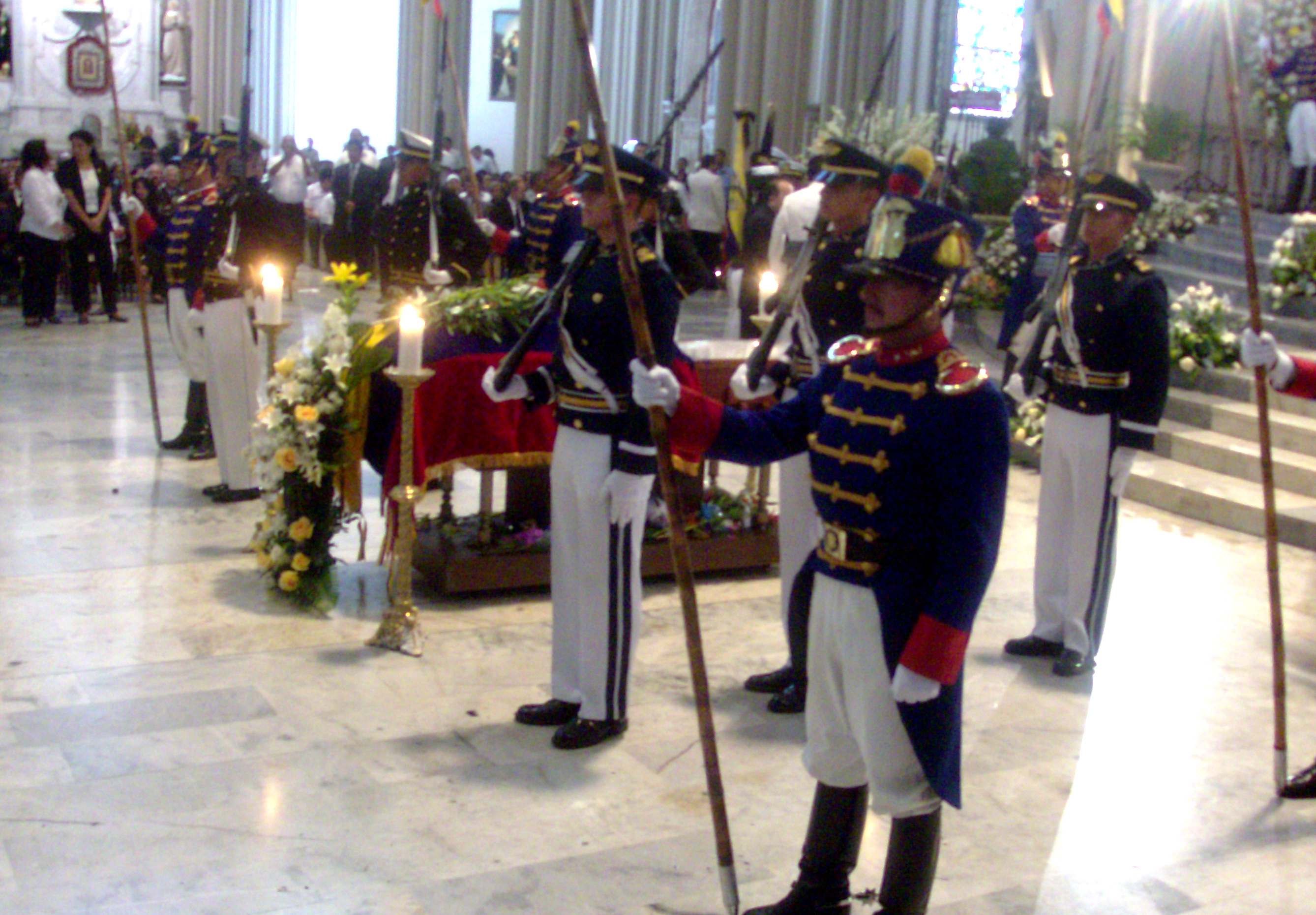 Velatorio del ex presidente Leon Febres Cordero